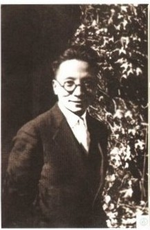 中文（台灣）: 張景鉞院士1931年在瑞士巴塞爾大學